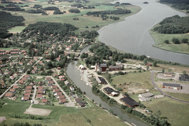 Göta kanal vid Norsholm. Bilden är tagen mot (väderstreck): V Motiv: Norsholm Nyckelord: Flygbilder, Riksintressen Kategori: Kanalanläggning Göta kanal vid Norsholm. Bilden är tagen mot (väderstreck): V.